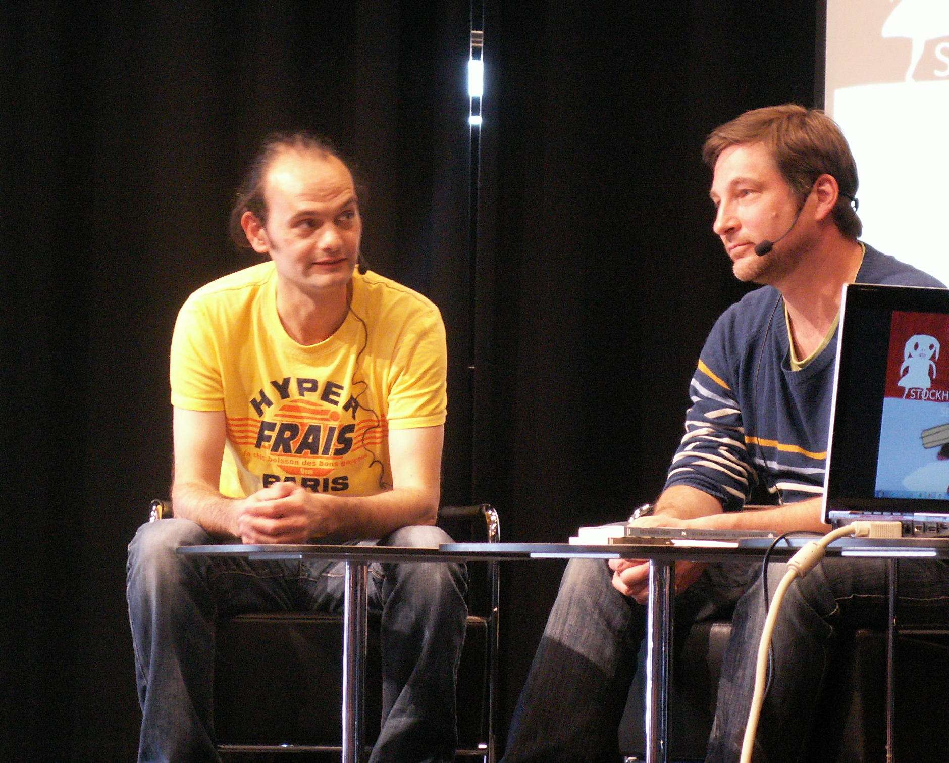 Olivier Martin och Sylvain Runberg, på Stockhoms internationella seriefestival.